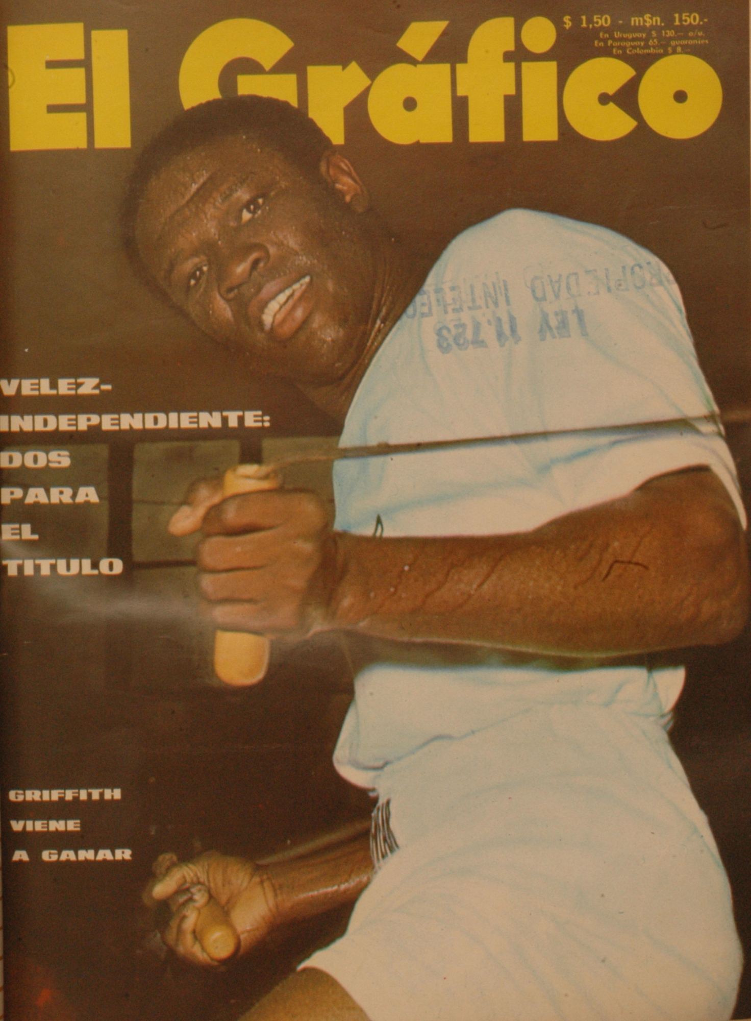 El Grafico del 21 de Septiembre de 1971. Edicion 2711